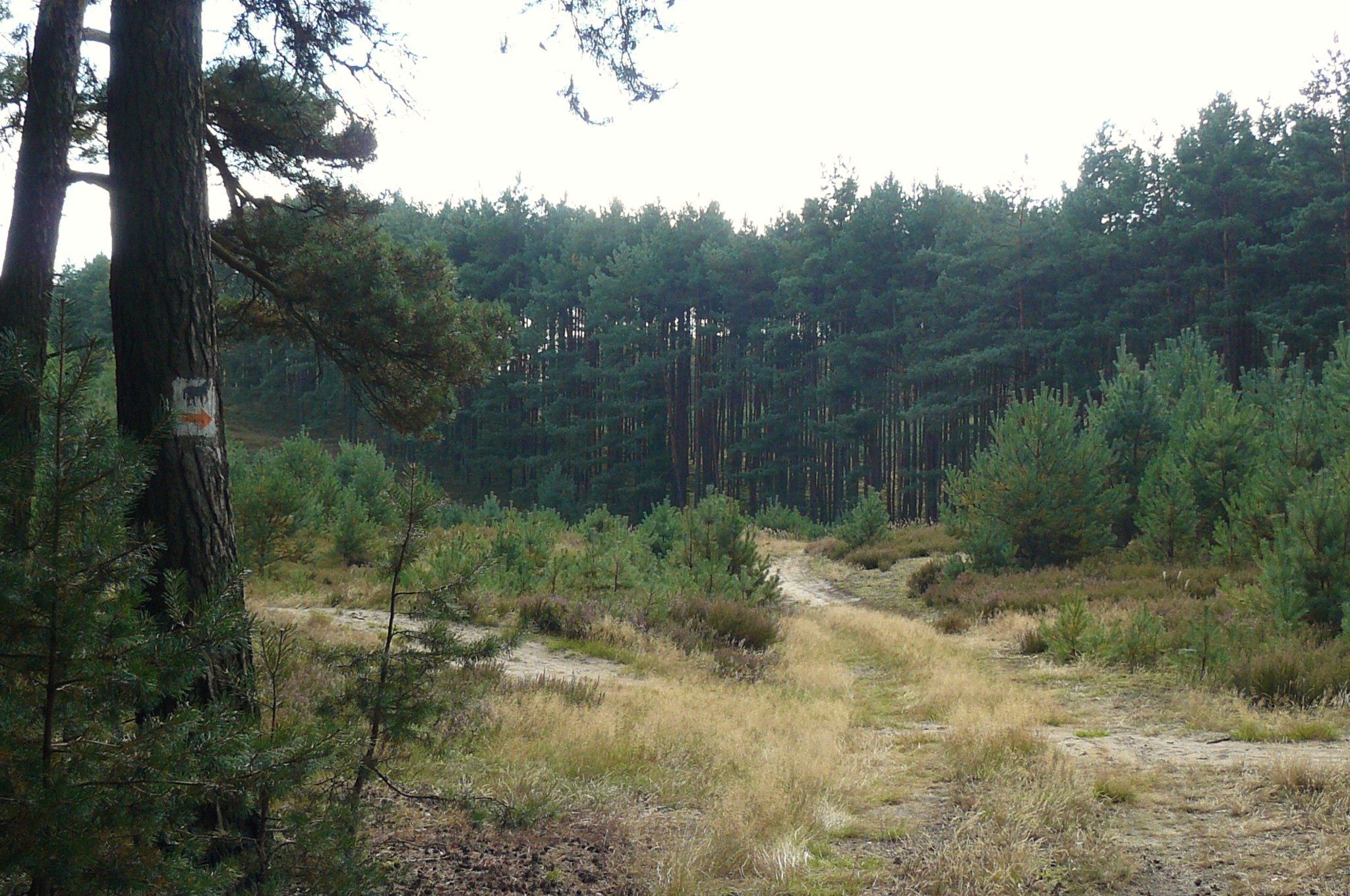 Wrzosowe wydmy, Puszcza Notecka, okolice Chojna.